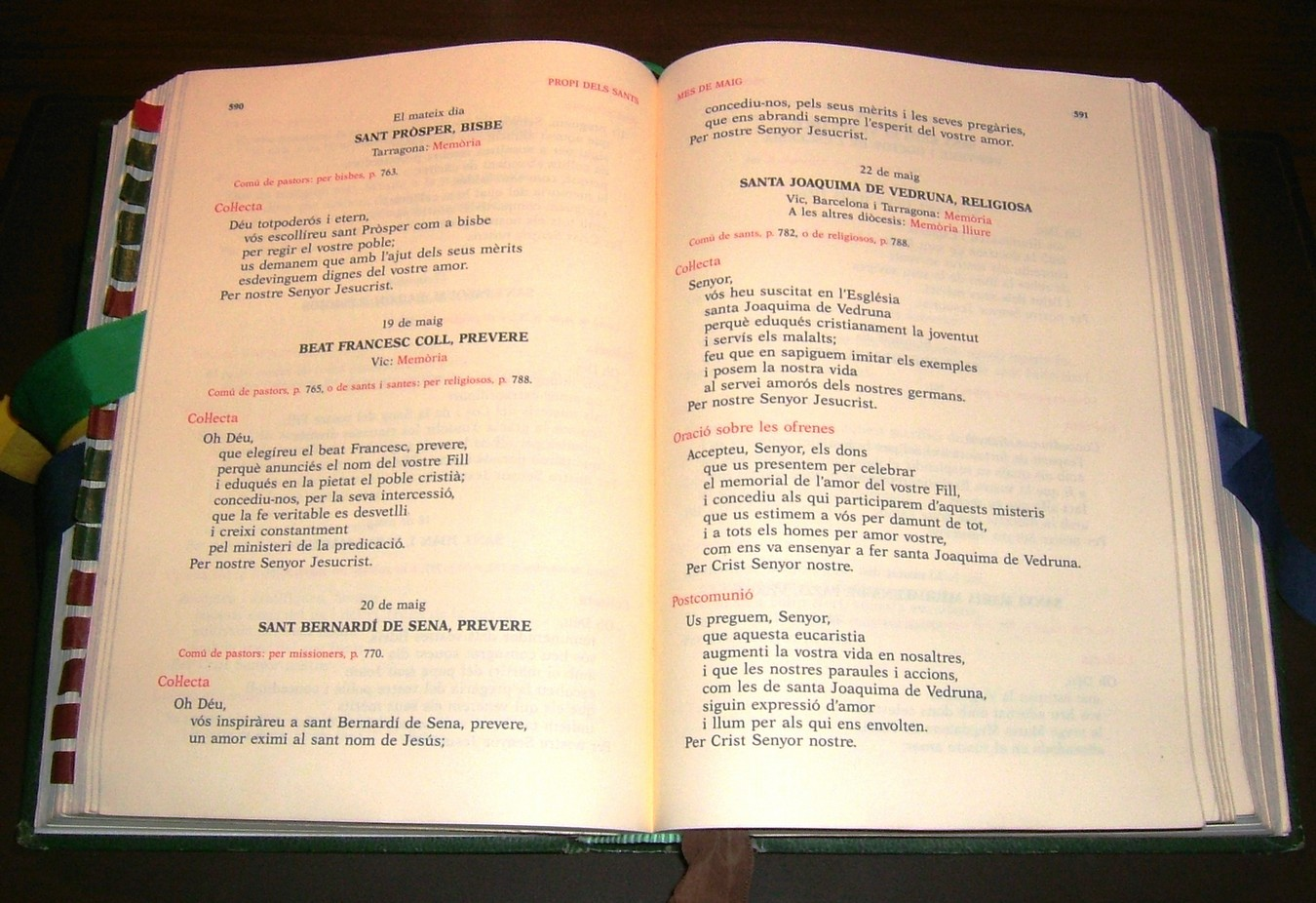 Fotografia de la secció del santoral, 22 de maig, del Missal Romà vigent actualment en l'Església Catòlica de ritu romà, en la seva edició catalana de 1991.